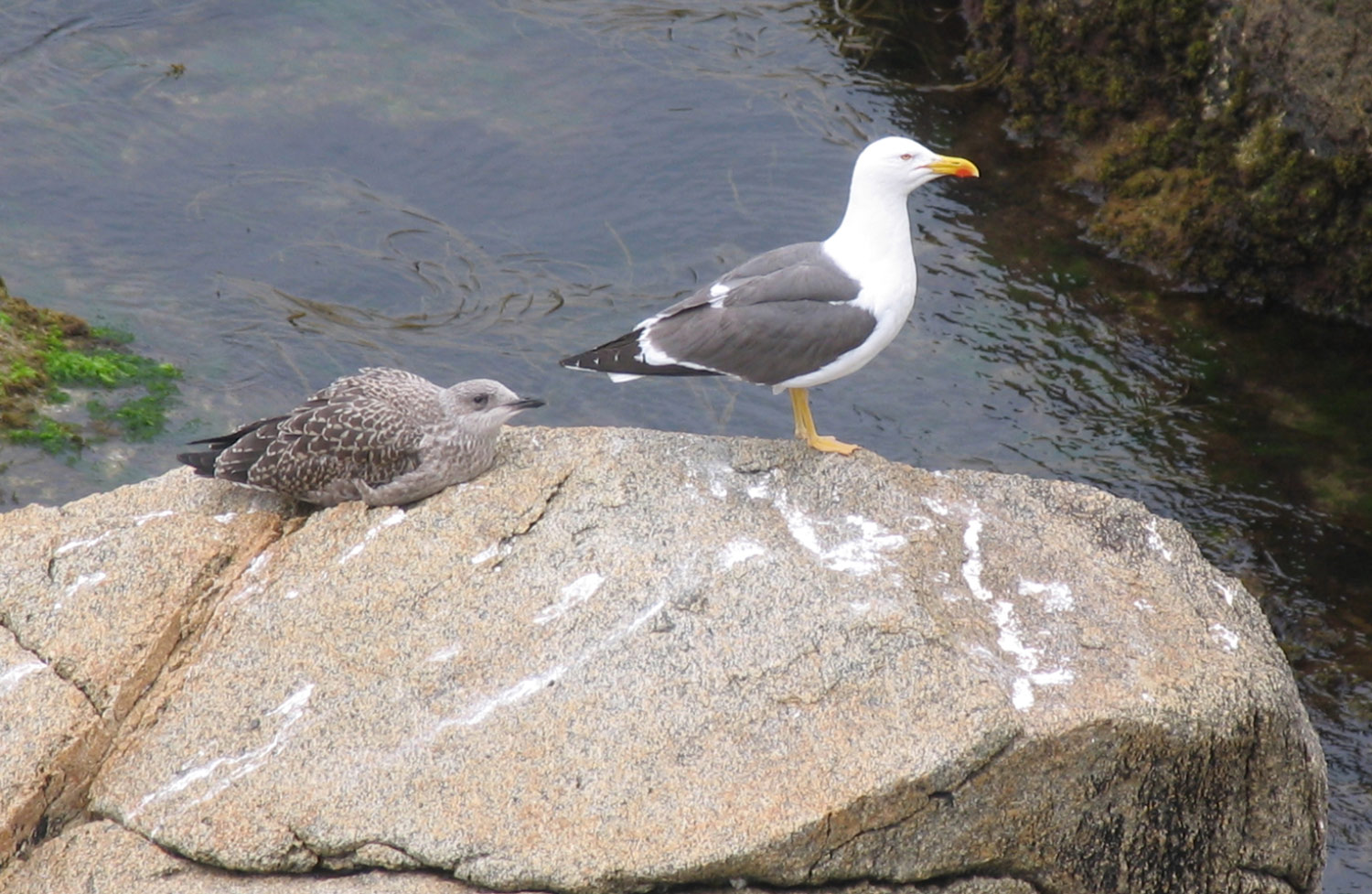 Description : Larus fuscus graellsii Goéland brun adulte et poussin Lieu : Ile d'Yeu / Vendée / France Auteur : Pline Photo personnelle